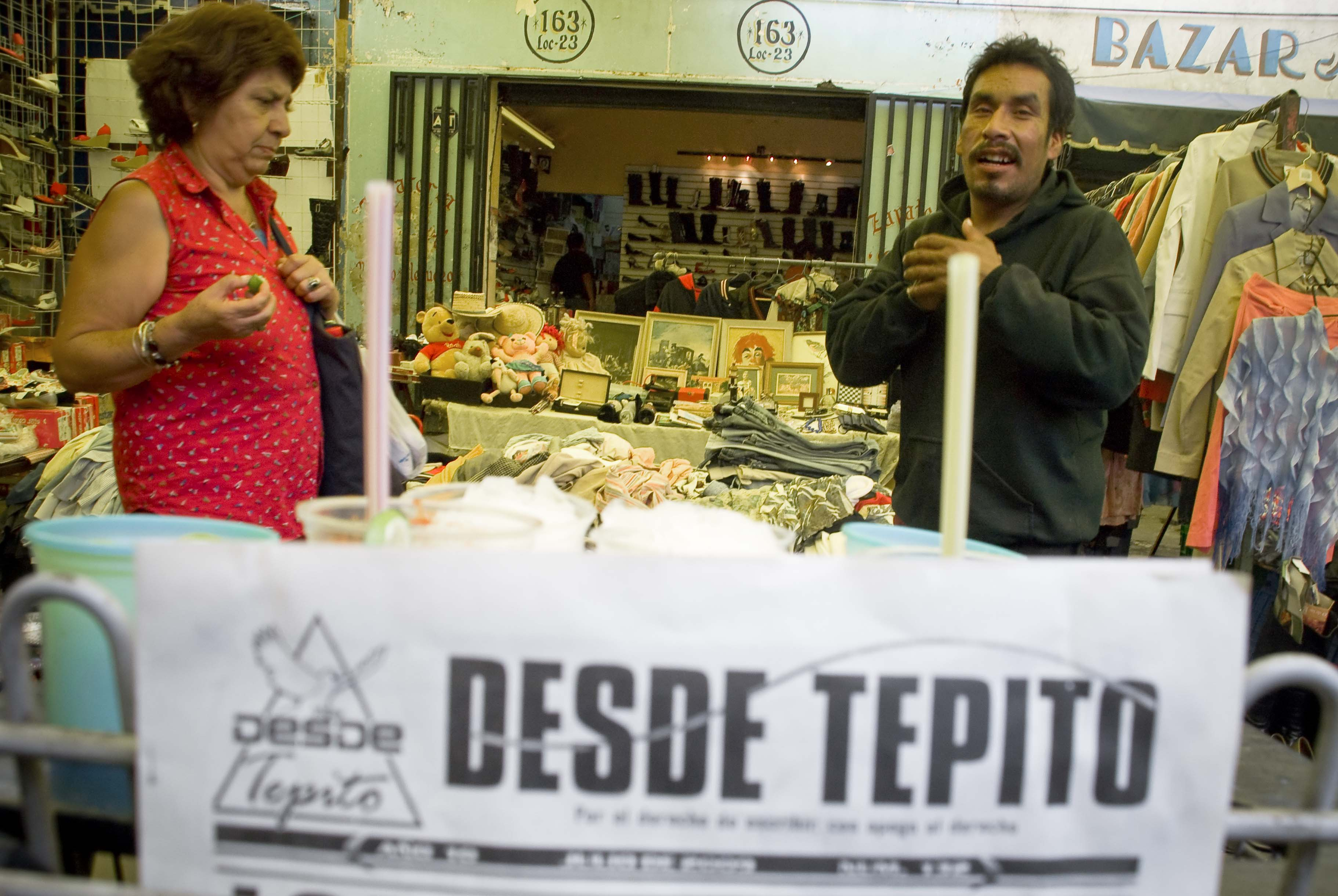 Así como lo leé. Estoy trabajando, junto con Sarihuella, en Tepito con los camaradas de "Ora World Mandala". Tienen un proyecto bien padre de Noviolencia y reconciliación. Hace unos días pudimos hacer lo que algunos consideran impensable: Caminar por el Barrio Bravo, con cámara en mano y fotografiando sin problema. Este proyecto me ha cambiado completamente la idea que tenía de Tepito, generada por años y años de propaganda negativa. ¡Saludos, Tepito!